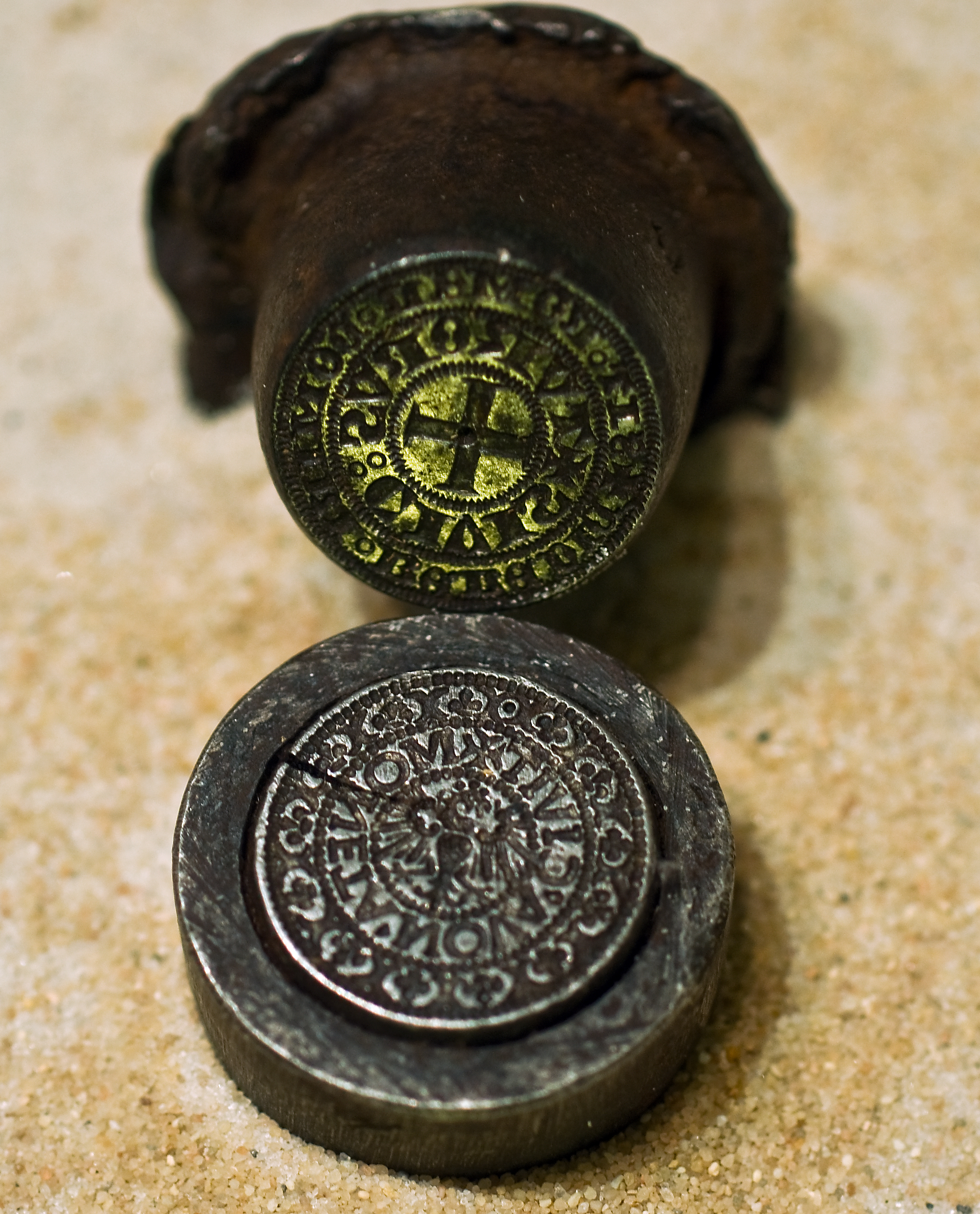 Historisches Museum Frankfurt am Main Prägestock zur Herstellung der Turnose, einer Münze aus dem 15. Jahrhundert